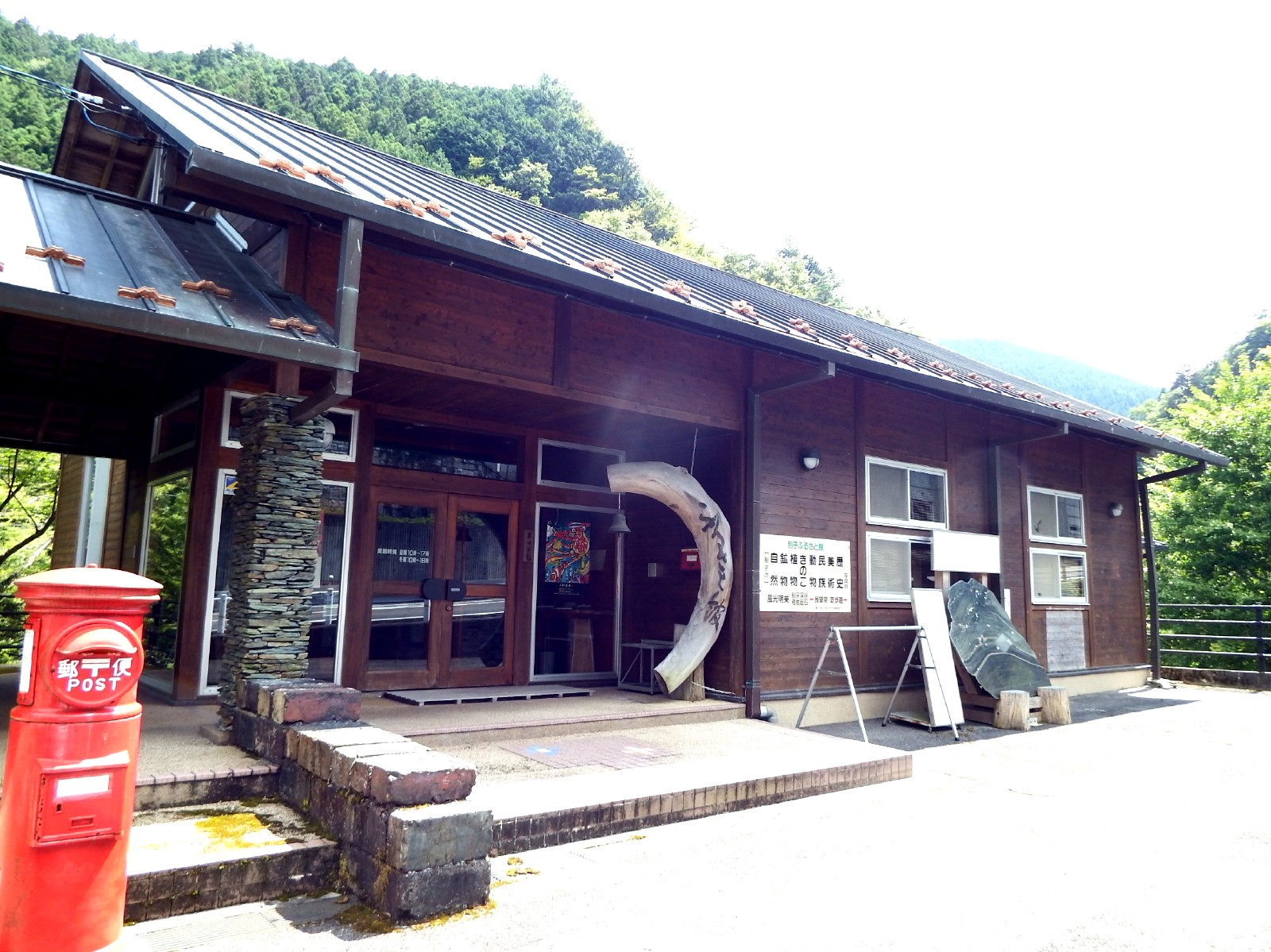 別子ふるさと館の正面